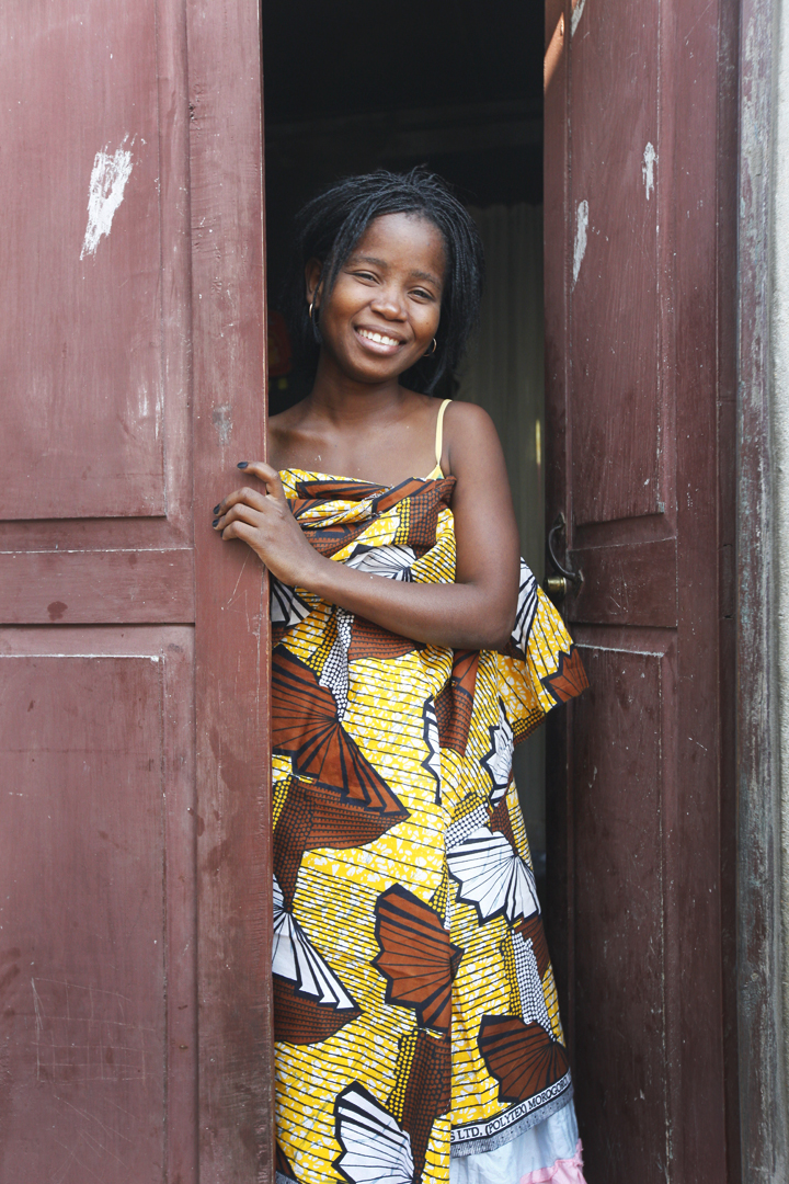 Mozambique 01200